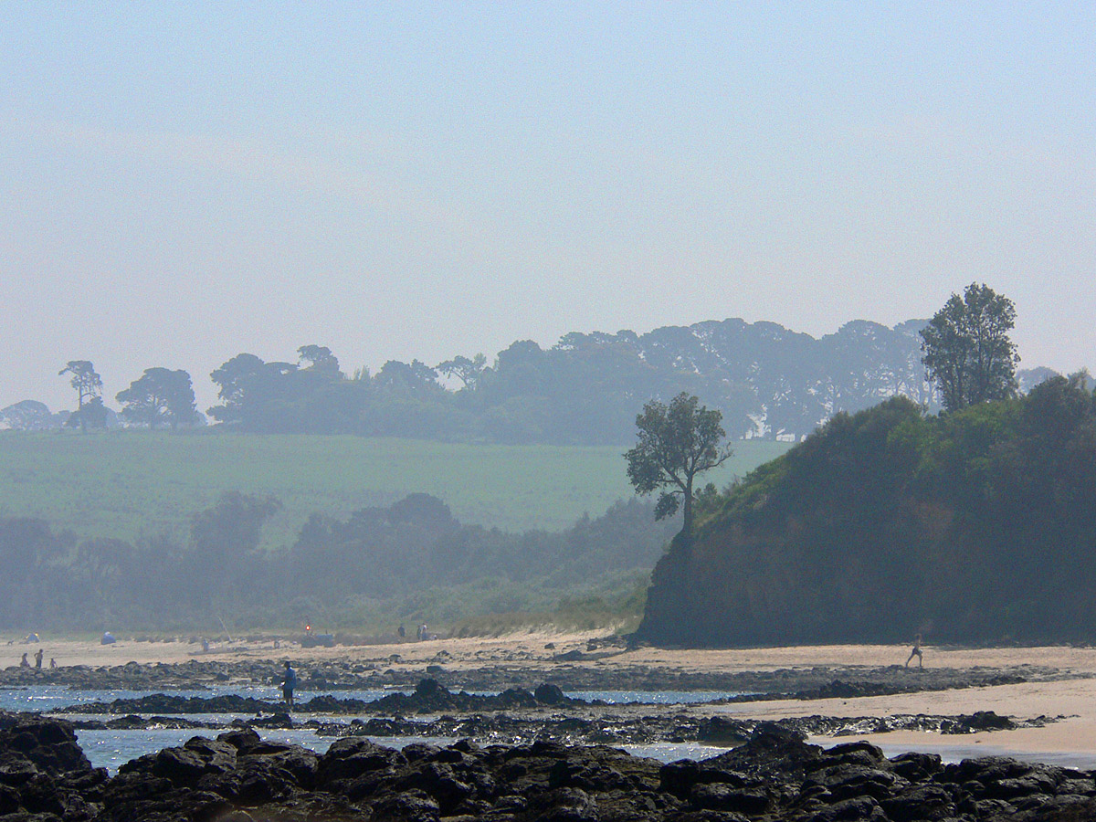 Merricks Beach